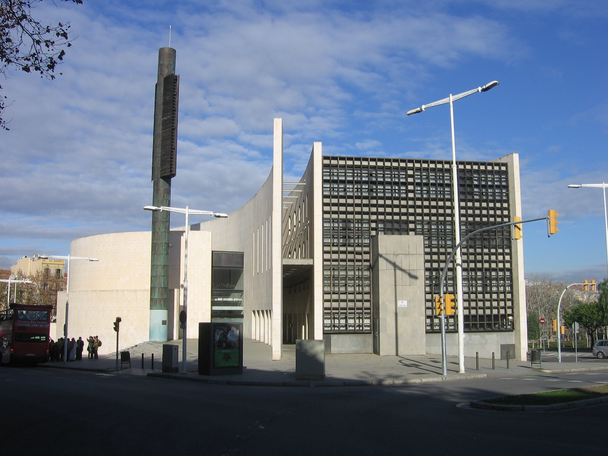 Parroquia del Patriarca Abraham (1990-1992), de Agustí Mateos y Josep Benedito.